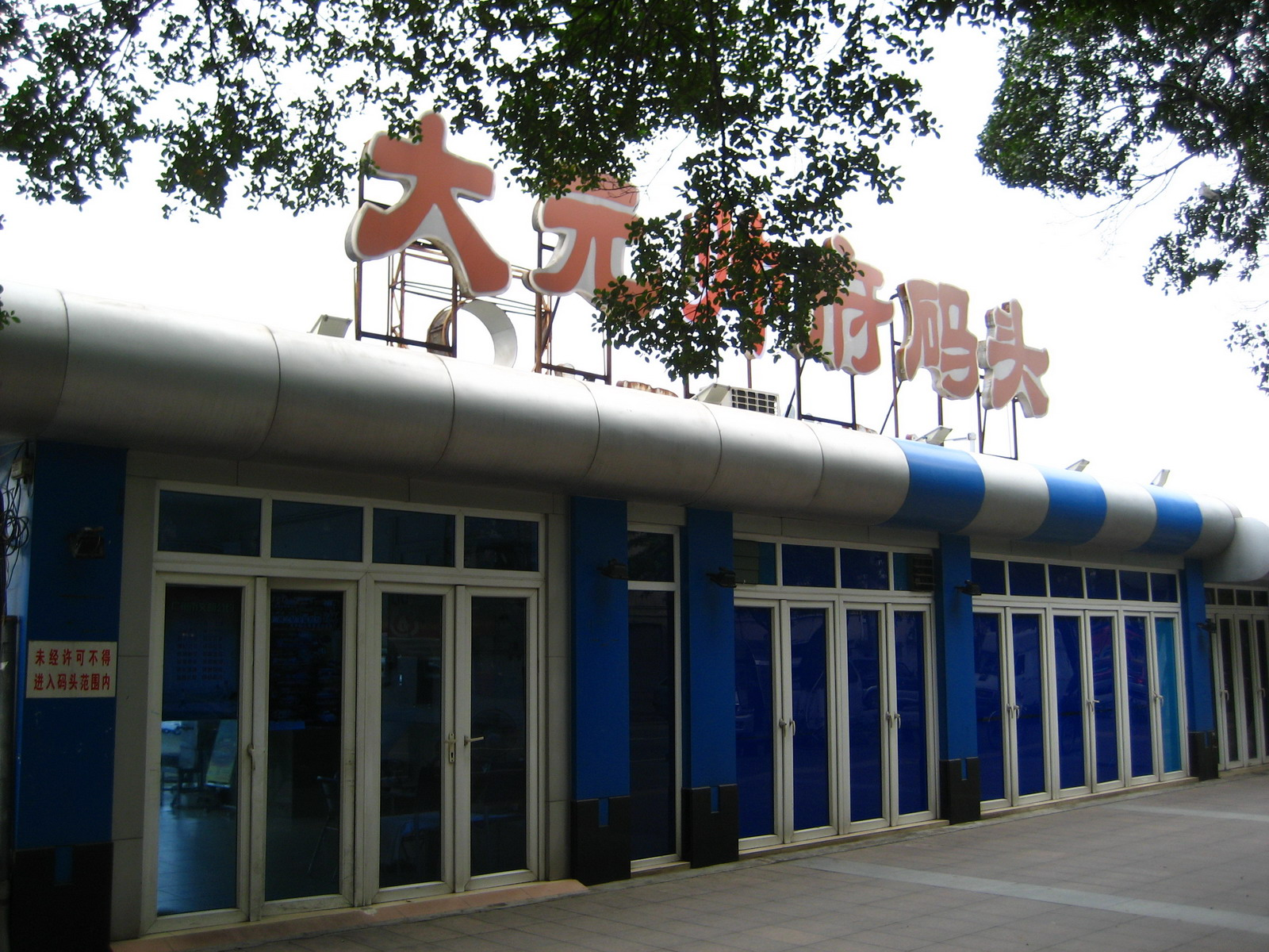 中文（台灣）: 廣州大元帥府碼頭